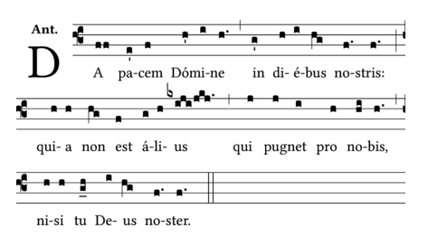 Da pacem, Domine, in diebus nostris, quia non est alius qui pugnet pro nobis, nisi tu Deus noster. Antiphona saeculi noni